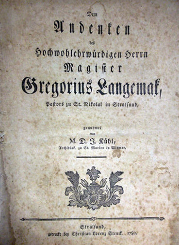 Titelblatt = Dem Andenken des hochwohlgelehrwürdigen Herrn Magister Gregorius Langemak Pastor zu St. Nikolai In Stralsund, gewidmet M.D. J.Kühl Archibar zu St. Marien in Wismar 1780, nochmals nachbearbeitet